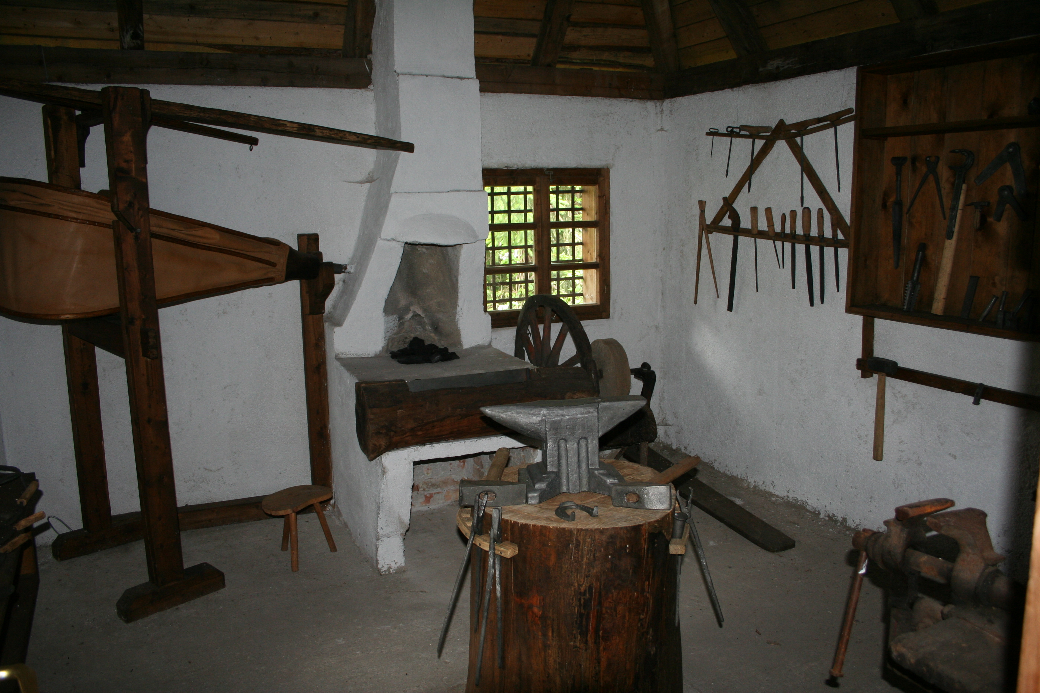 Muzej "Staro selo" Sirogojno